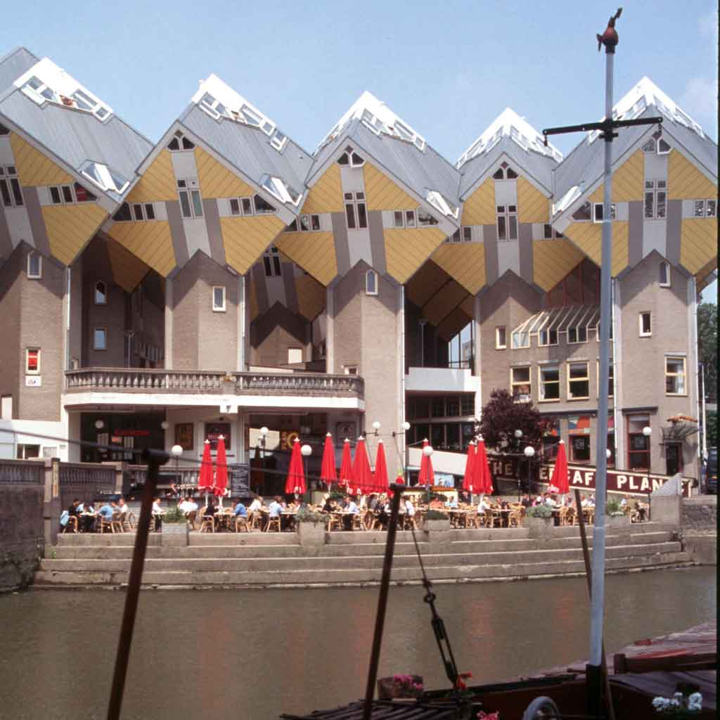 Kubushäuser - originelle Siedlung von auf jeweils einer Spitze stehenden würfelförmigen Einzelhäusern.